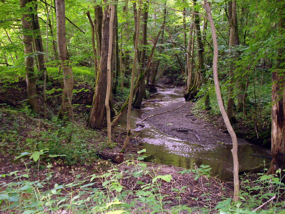 Böhlgrund bei Zell a. Ebersberg, Landkreis Haßberge